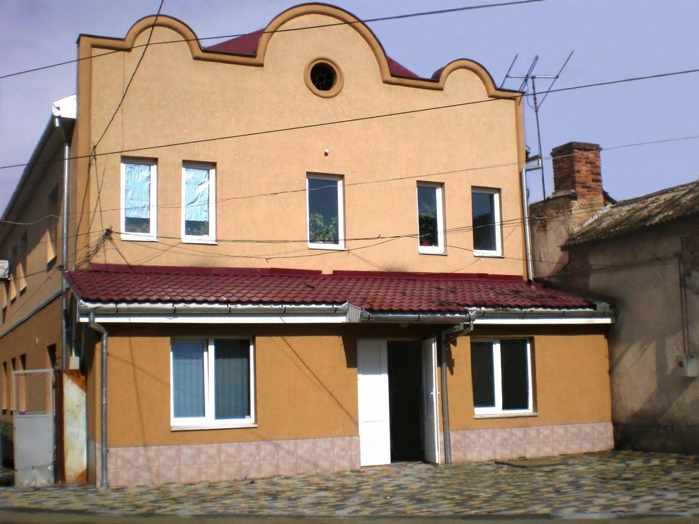 Бывшая синагога Спинкер ребе Йосеф-Меира Вайса.